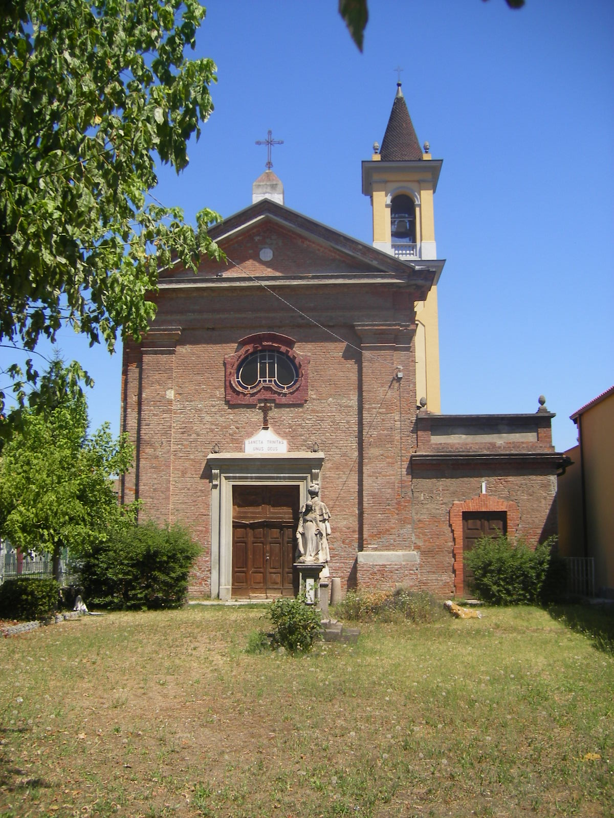 Oratorio SS. Trinità, Spinetta Marengo (comune Alessandria)